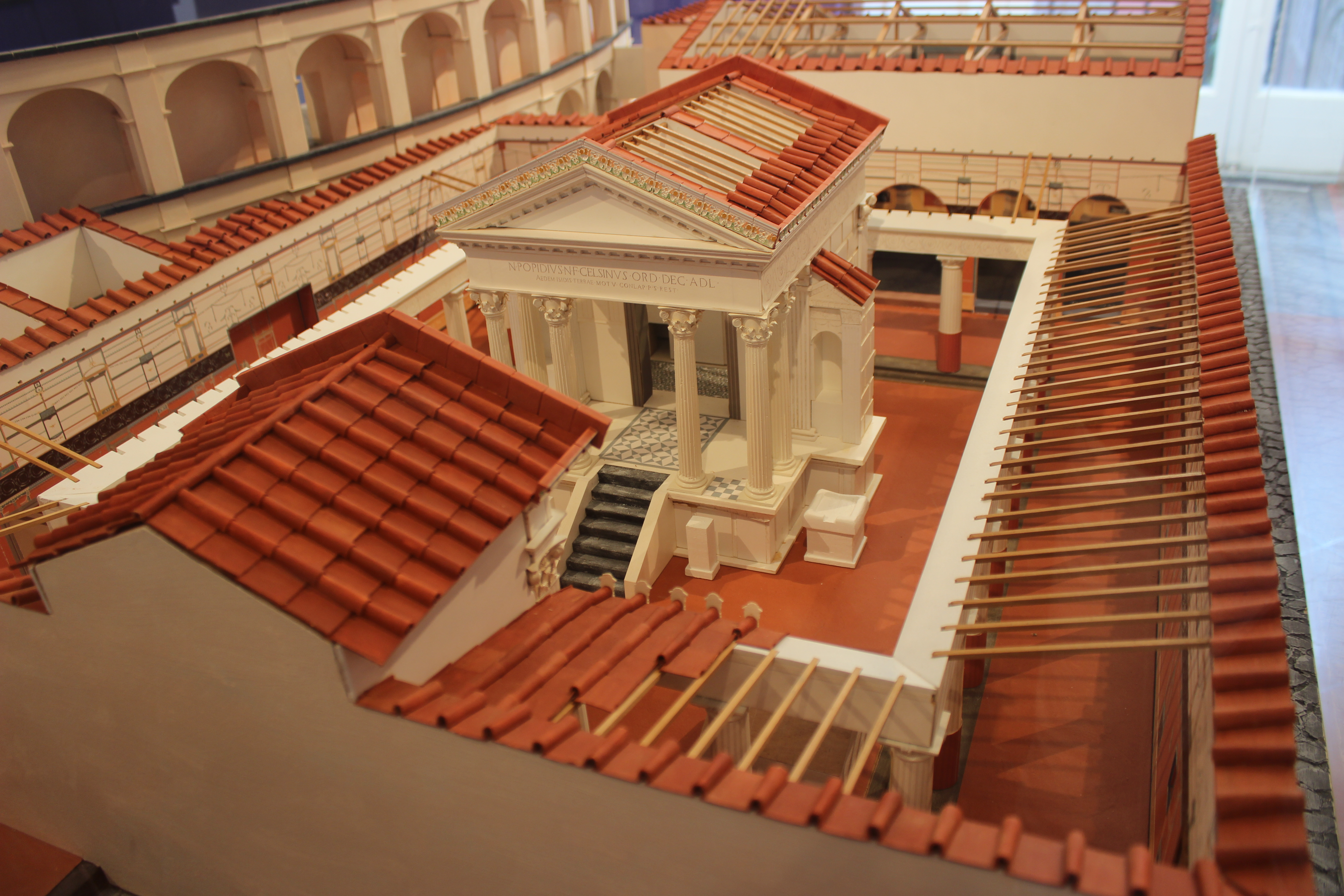 Maqueta del conjunto del templo de Isis en Pompeya. Nápoles, Museo Arqueológico Nacional.